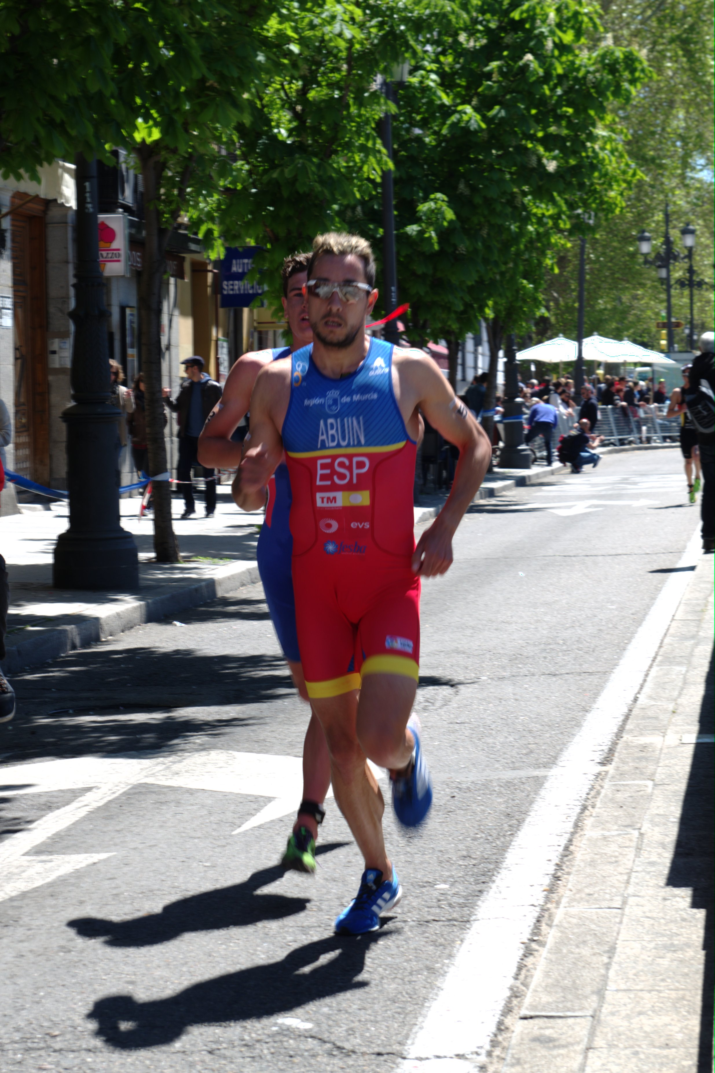 Uxío Abuín, triatleta galeo, no Campionato de Europa de Madrid no 2016.